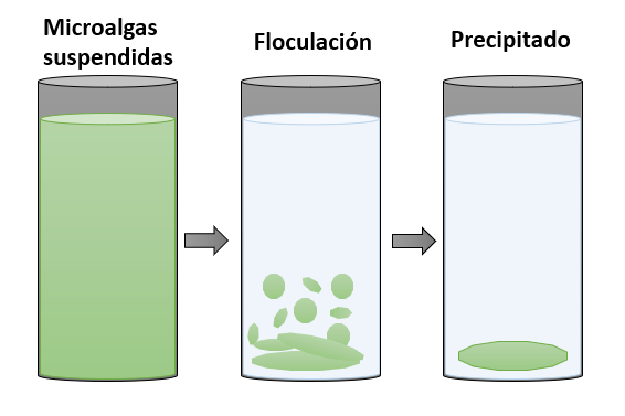 Floculación